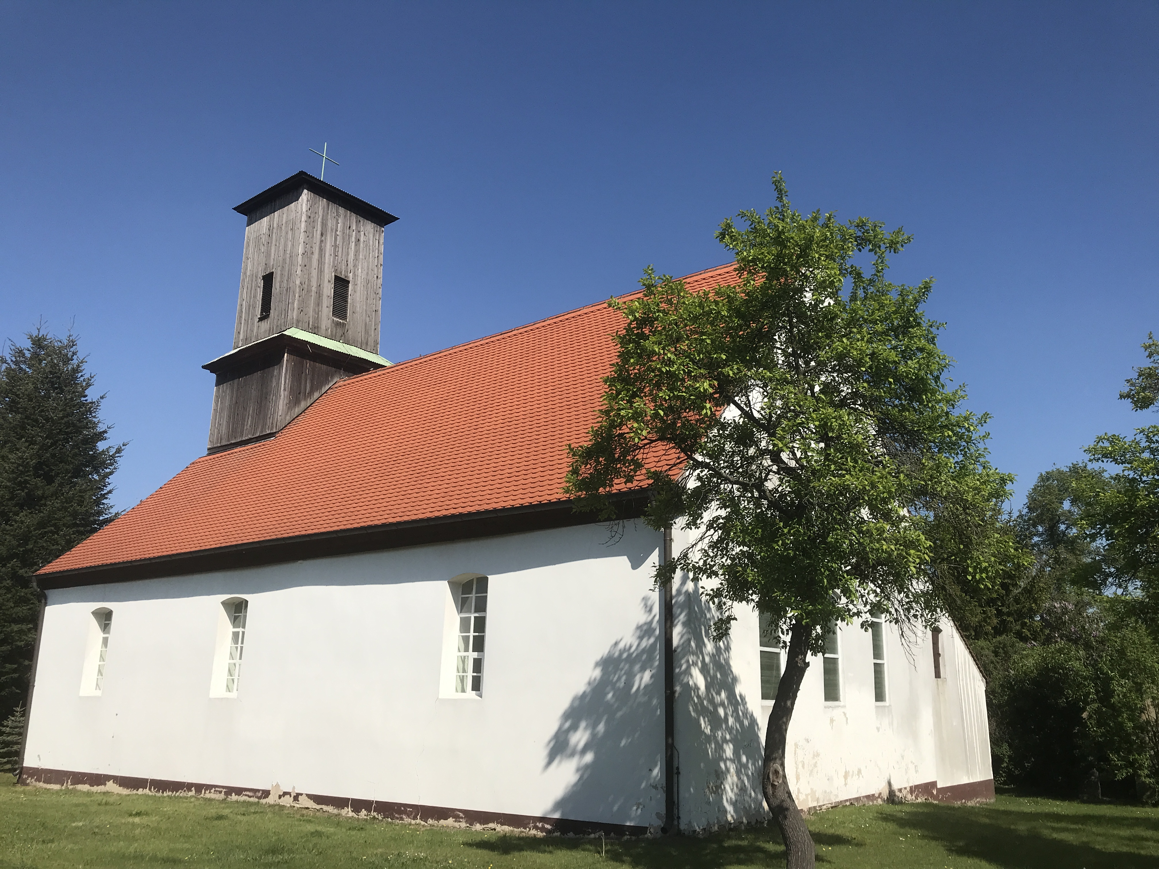 Die Dorfkirche Pillgram im gleichnamigen Ortsteil der Gemeinde Jacobsdorf im Landkreis Oder-Spree ist eine Feldsteinkirche aus dem Mittelalter. Die Kirchenausstattung ist neuzeitlich aus den 1950er Jahren.